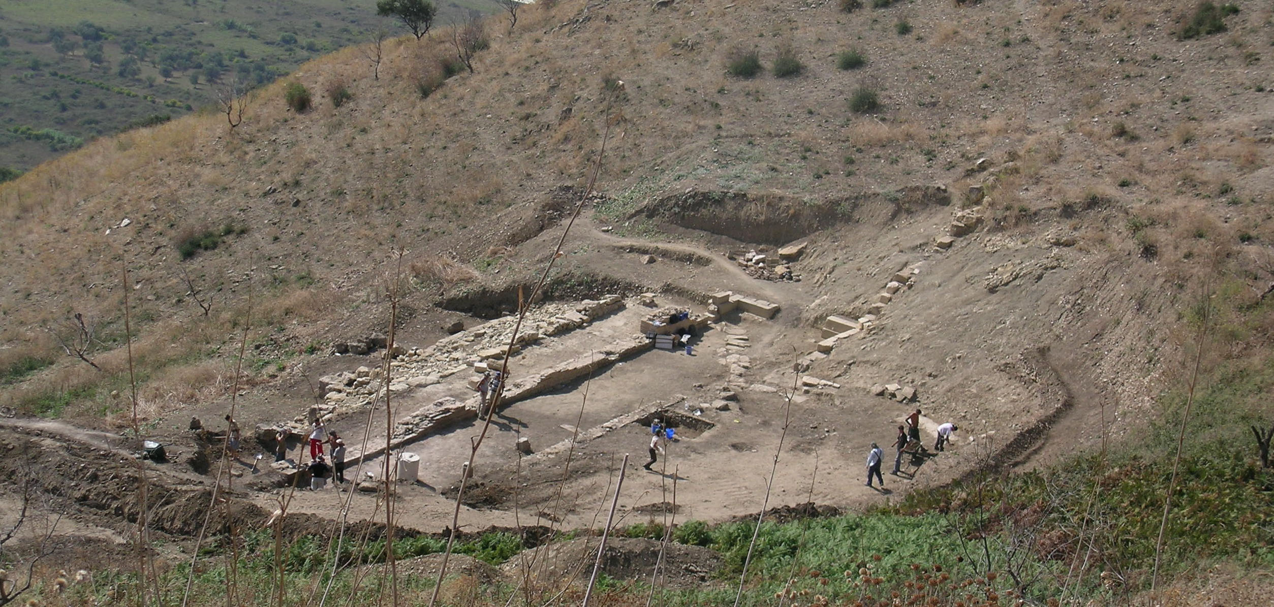 veduta del teatro di Phoinike (Albania)